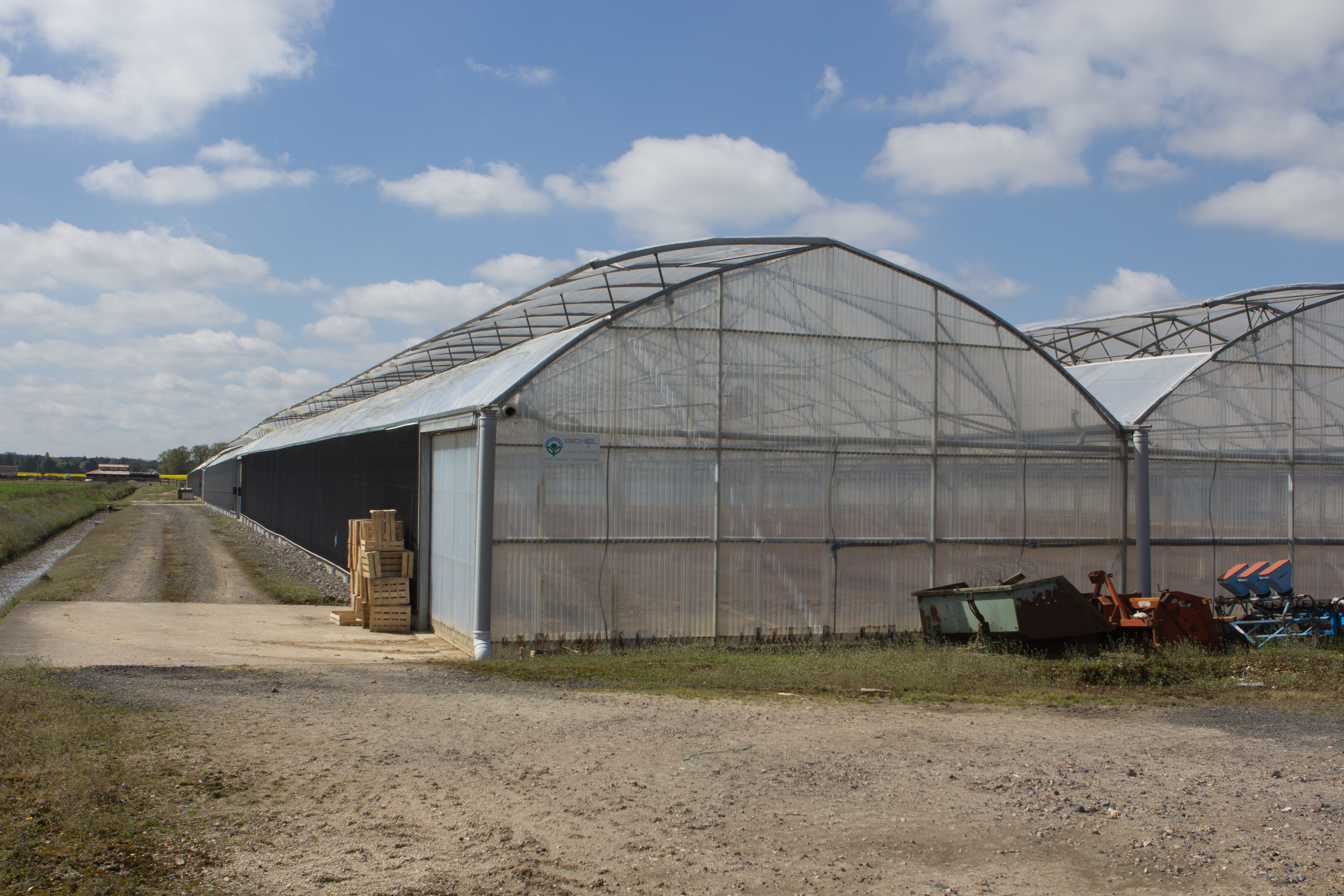 Paysage de Chailly-en-Bière (Commune de Chailly-en-Bière, Seine-et-Marne, France)